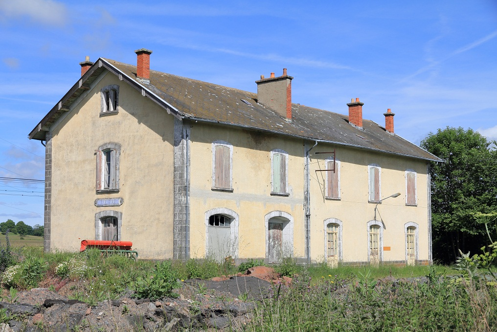 La gare de Talizat en juin 2011, Cantal, France.